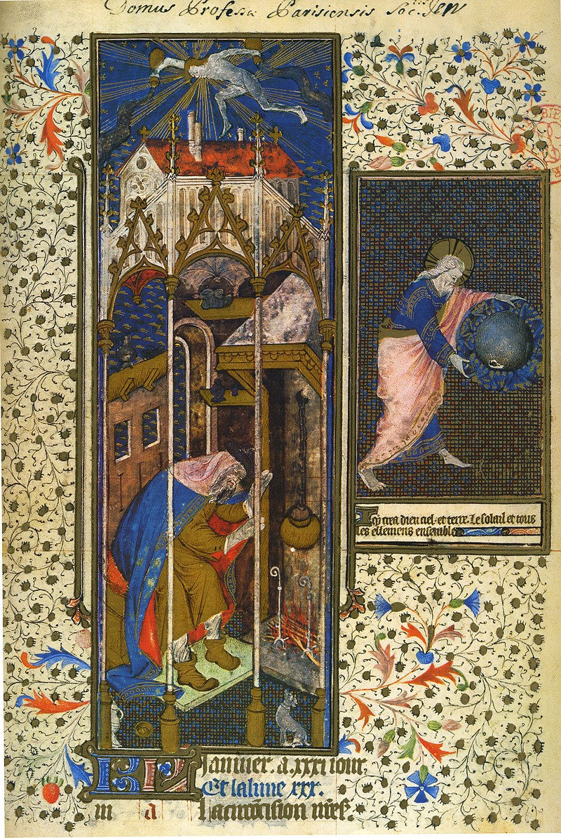 january